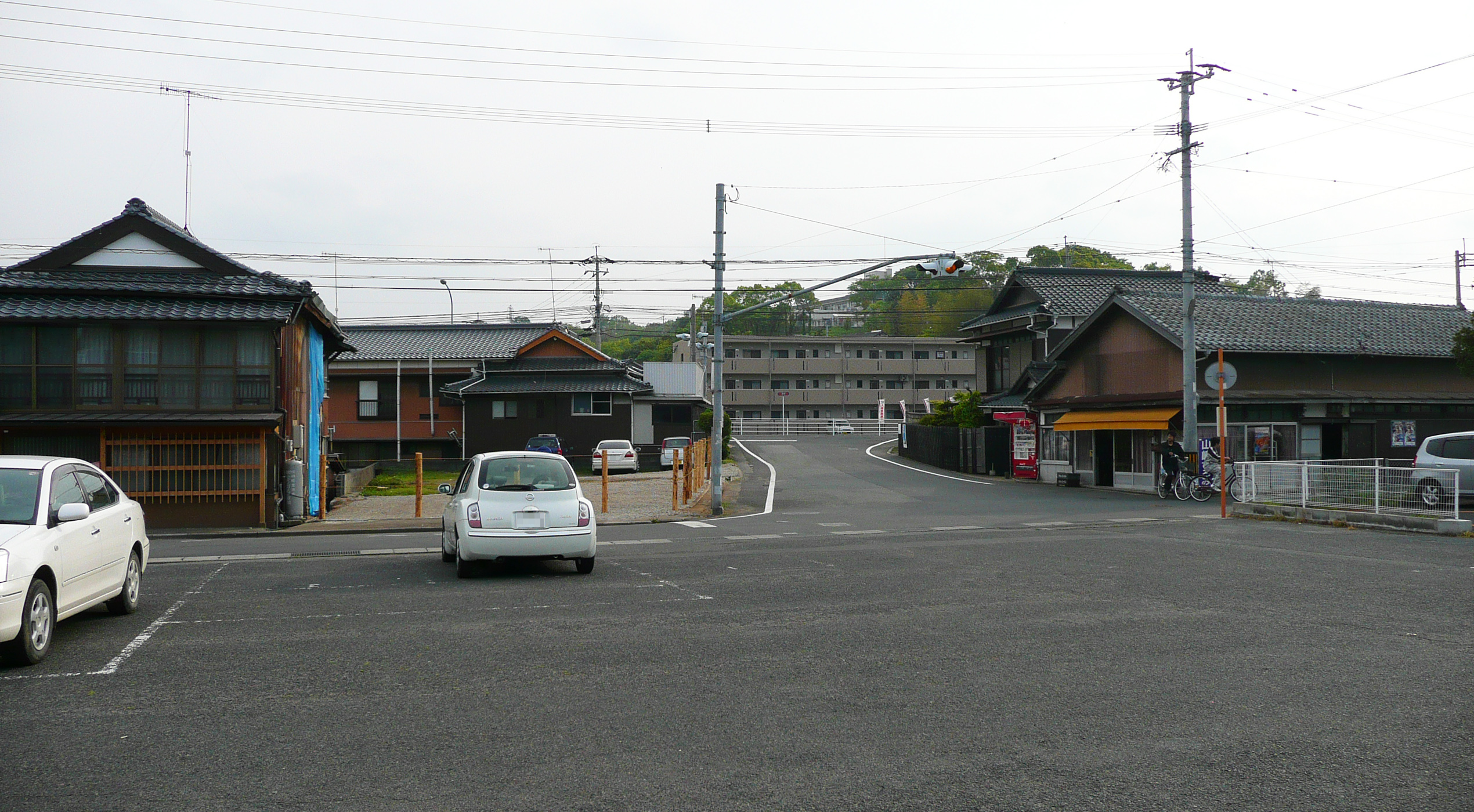 日豊本線・豊前松江駅 駅前広場（2007年撮影）